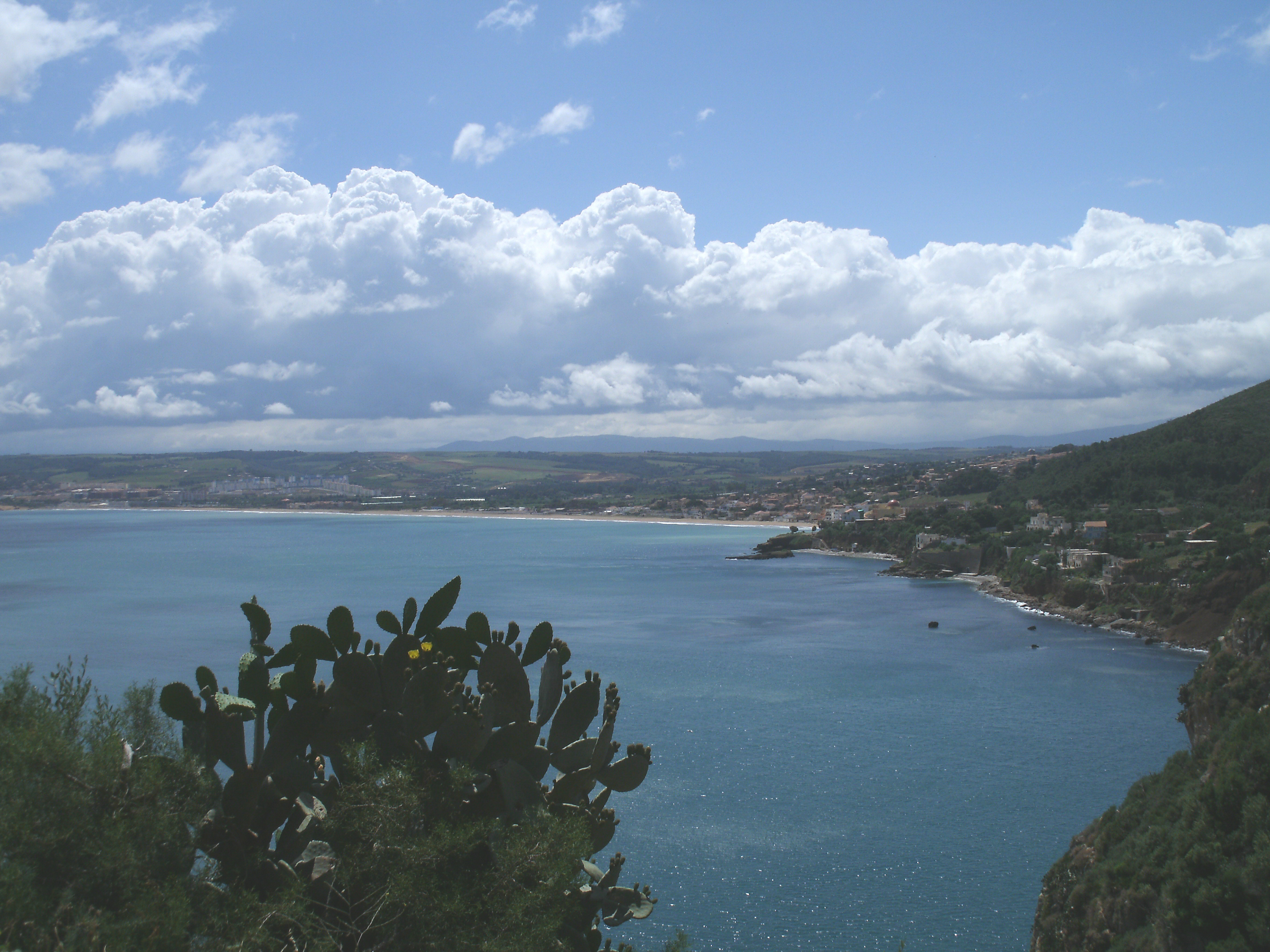 La plage du mont Chenoua — vue du Cap Chenoua, Tipasa.